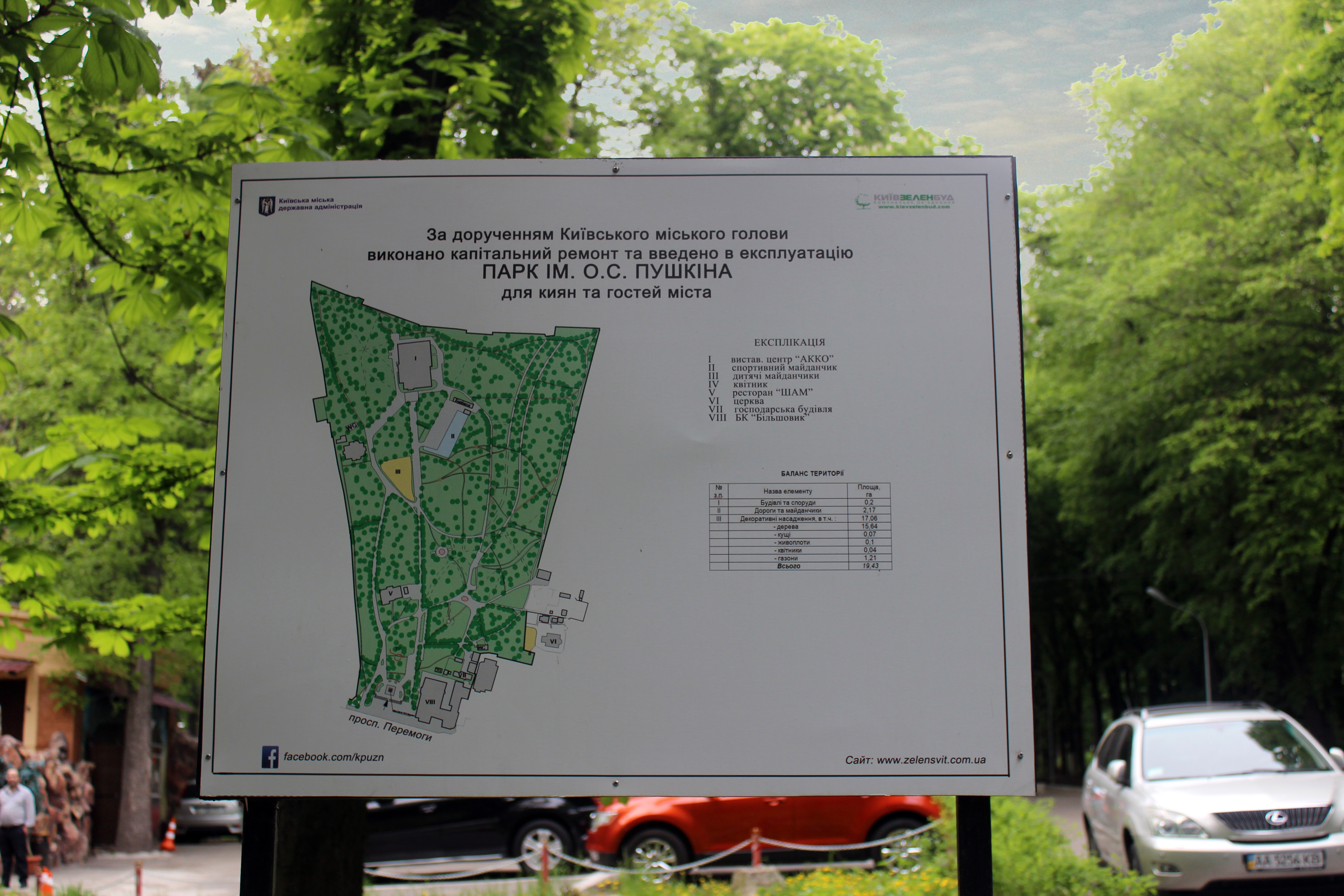 Ім. Пушкіна, Шевченківський район пр. Перемоги